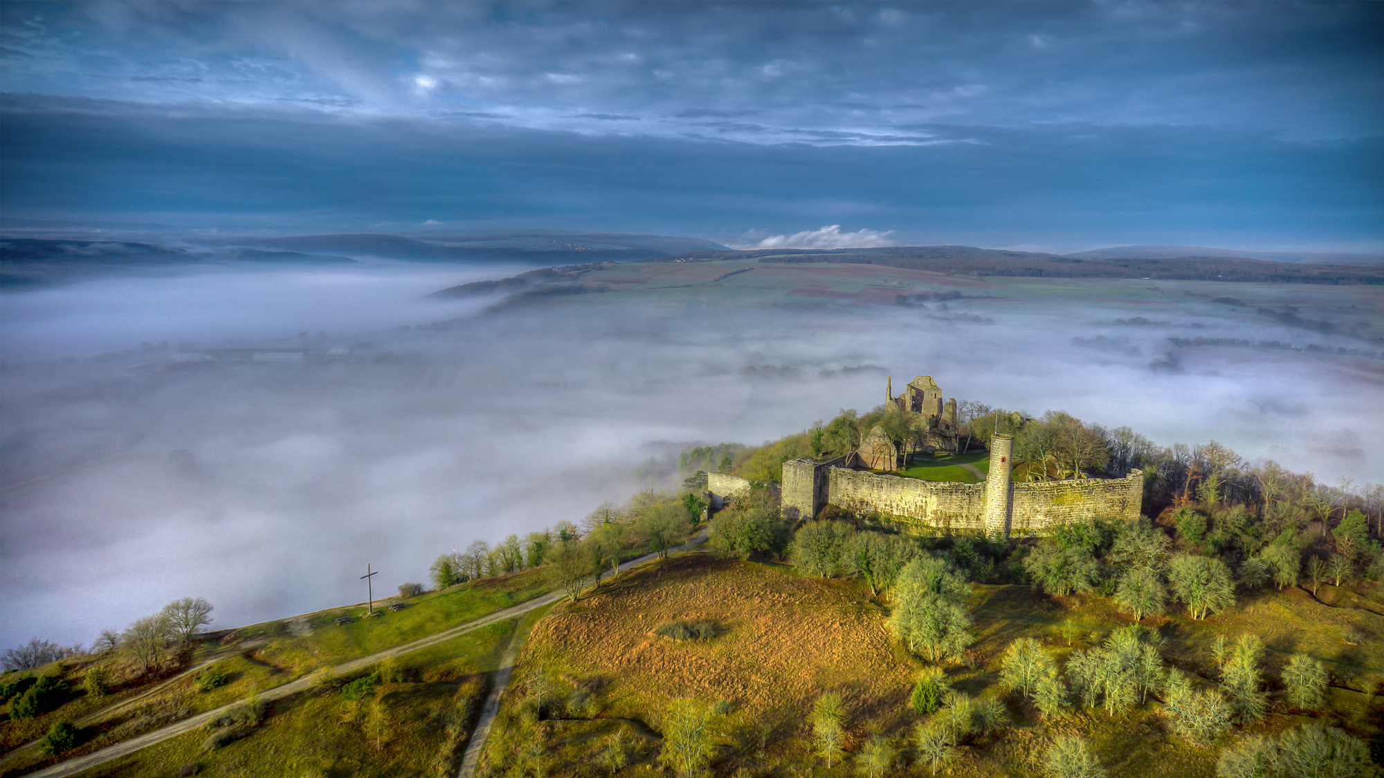 Zu sehen ist die Burgruine Homburg bei Gössenheim, im Naturschutzgebiet Ruine Homburg (NSG-00581.01)